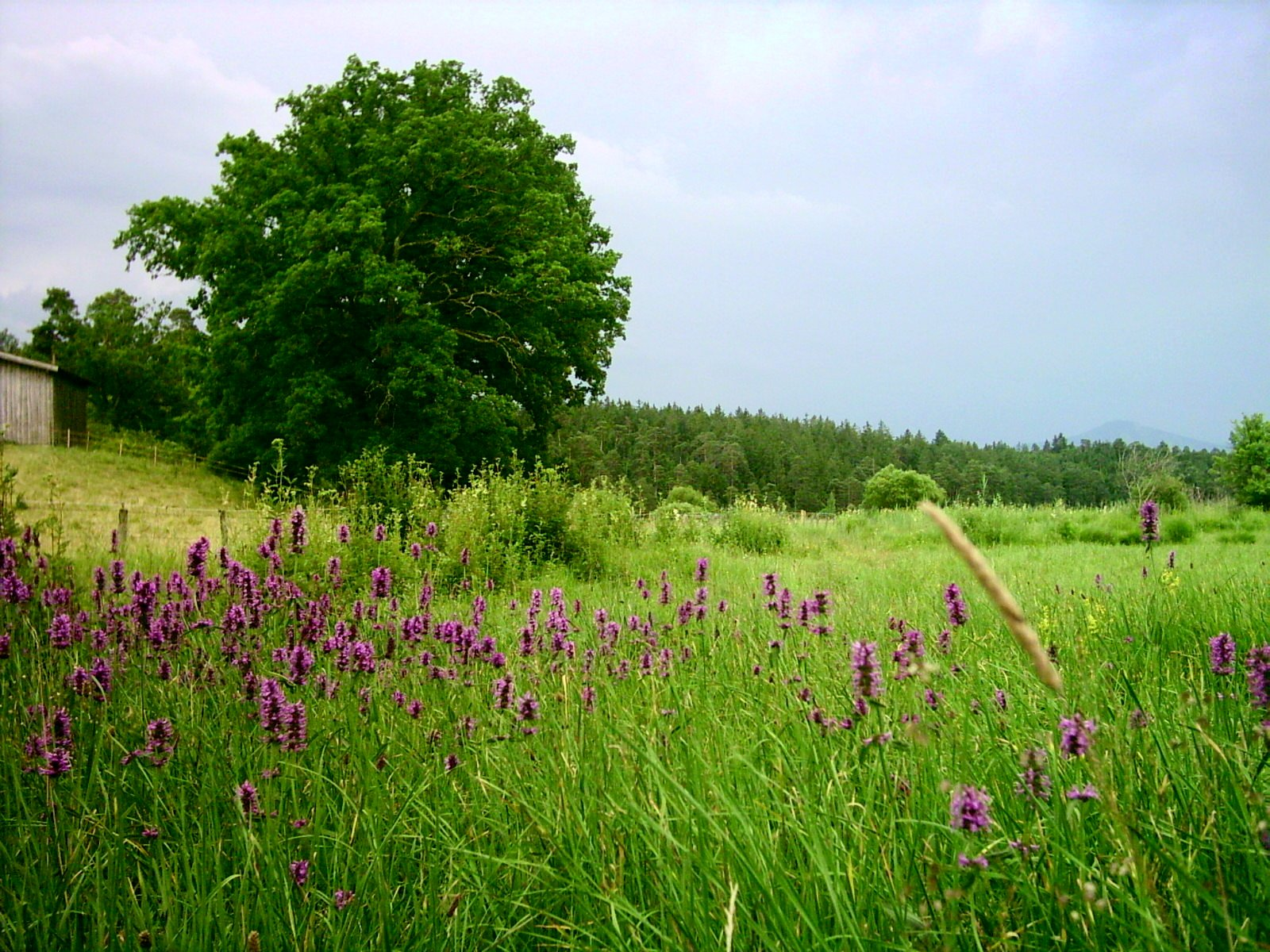 Gewitterabend im Naturschutzgebiet Osterseen, Position östlich des Nordende des Großen Ostersees, Blick nach Süden